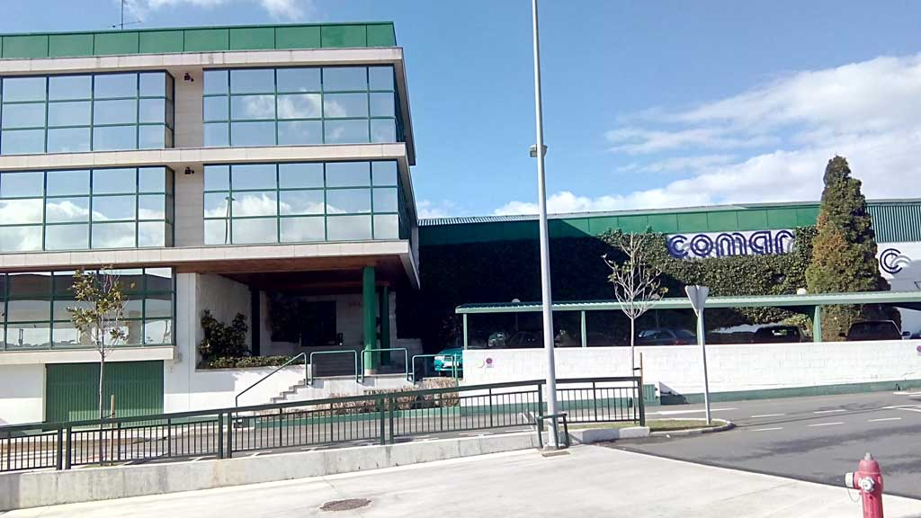 Sede de Comar na Grela.